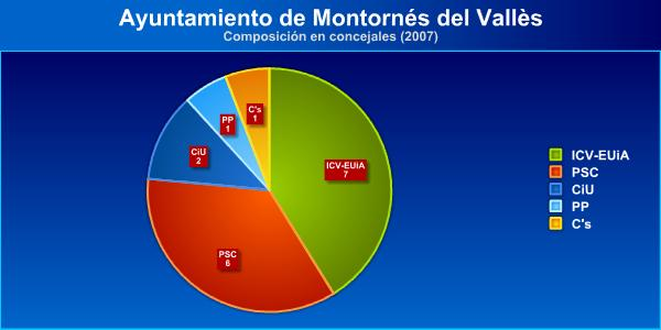 Монторнес-дель-Вальес.